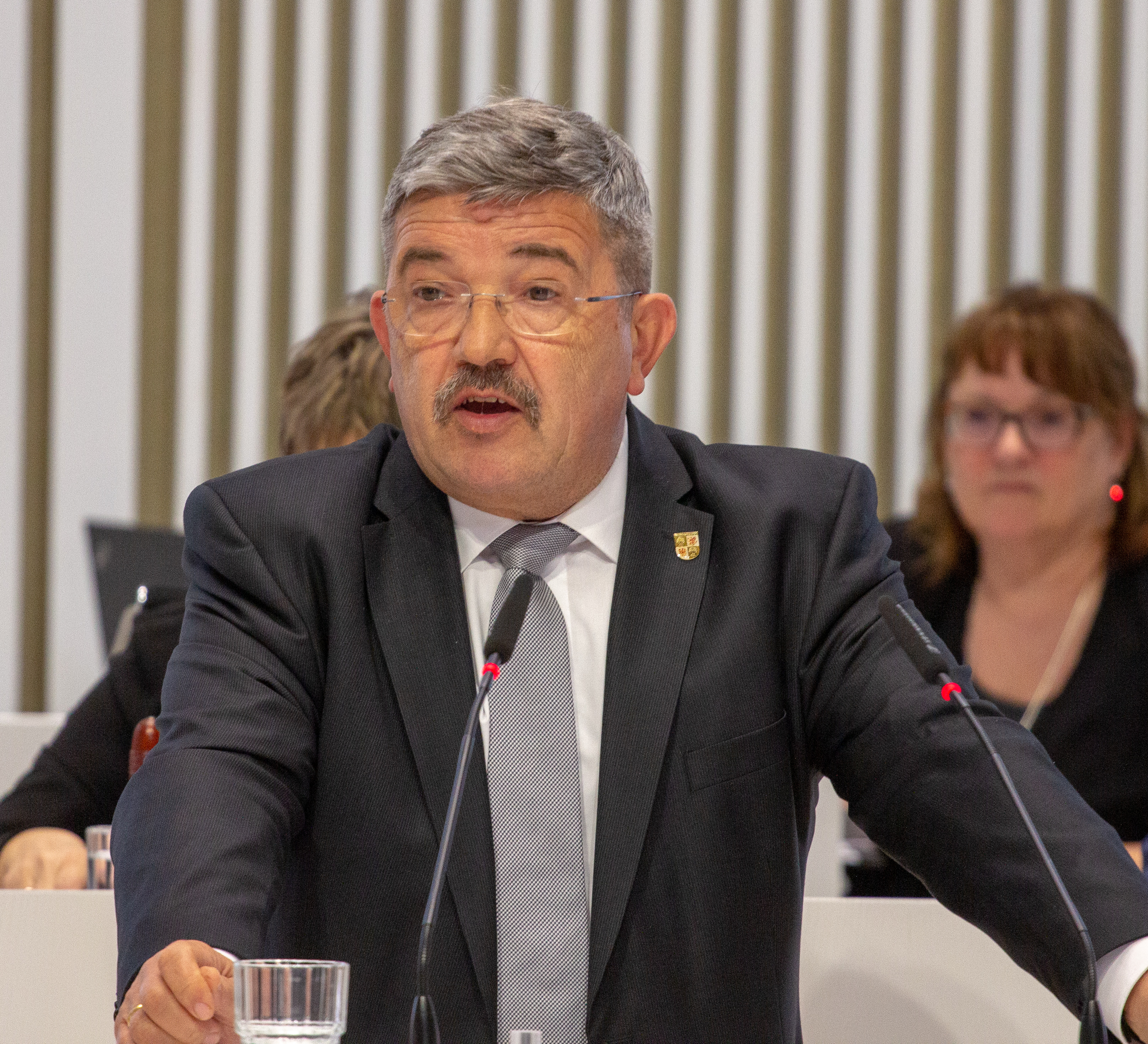 Lorenz Caffier im Plenum des Landtages Mecklenburg-Vorpommern im März 2019.